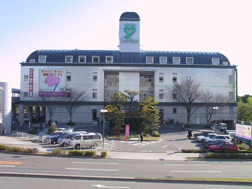 広島サンプラザ・商業施設「アルパーク」側正面（2002年12月14日、南八尾電車区撮影）